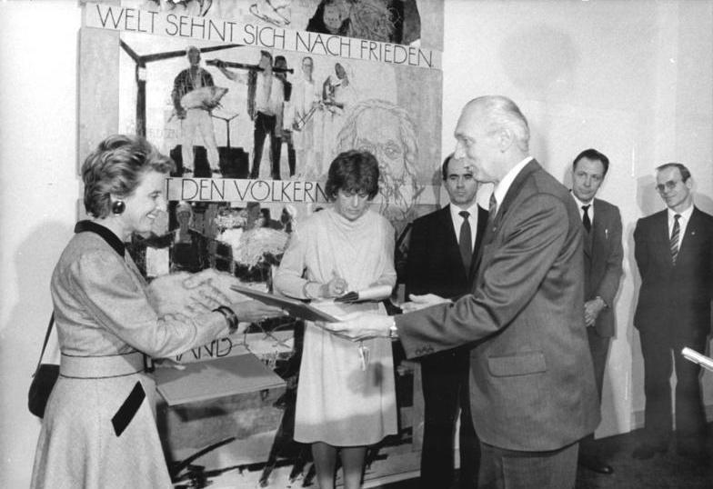 ADN-ZB Zimmermann-30.12.87-Berlin: Notenaustausch- Der Stellvertreter des Ministers für Auswärtige Angelegenheiten der DDR Kurt Nier (vorn r.) und Außerordentliche und Bevollmächtigte Botschafter der Französichen Republik in der DDR, Frau Joelle Timset (l.) tauschten in Berlin Noten zur Übergabe einer Sammlung von historischen Dokumenten durch die DDR an die Französische Republik aus.